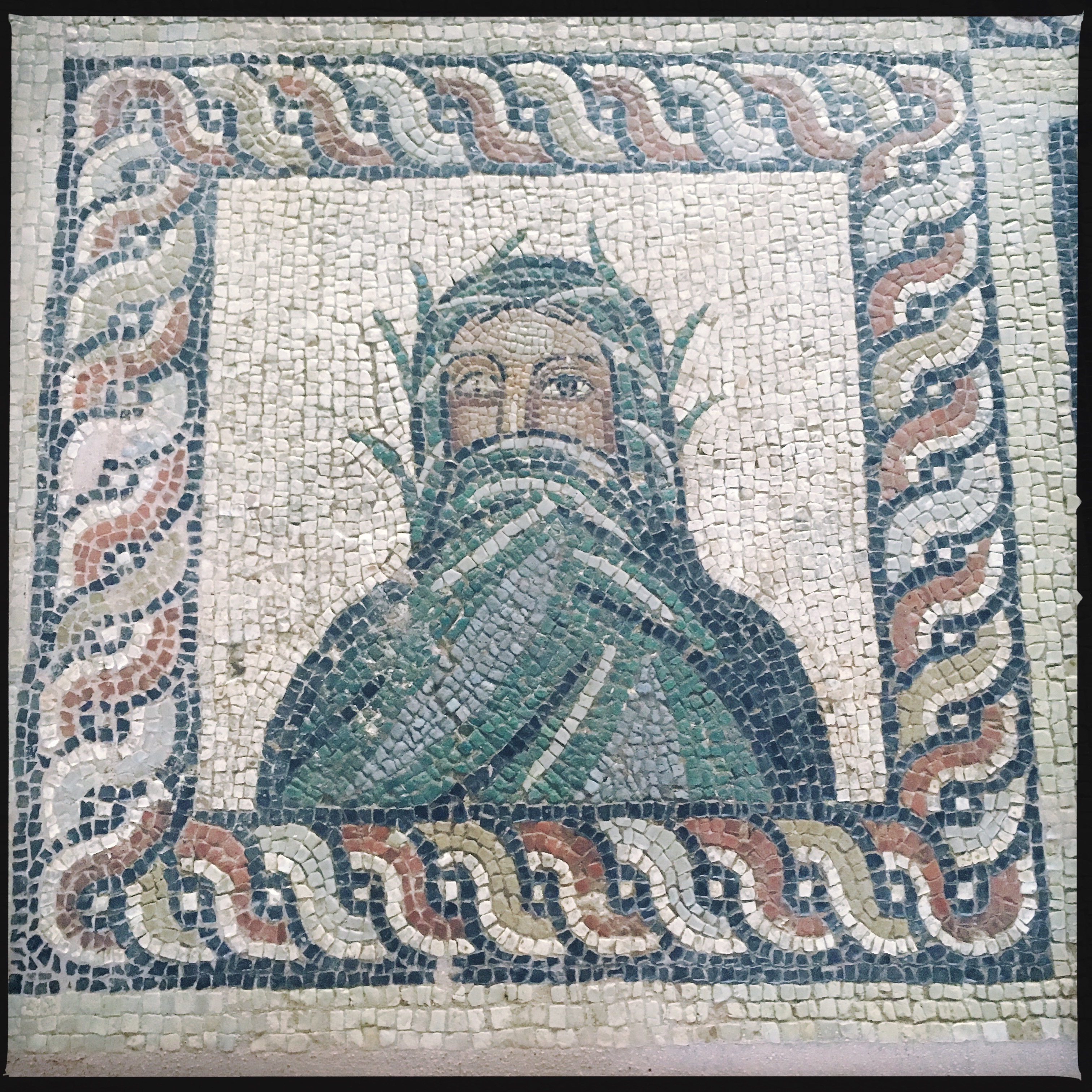 Κίσαμος«Κίσαμος»